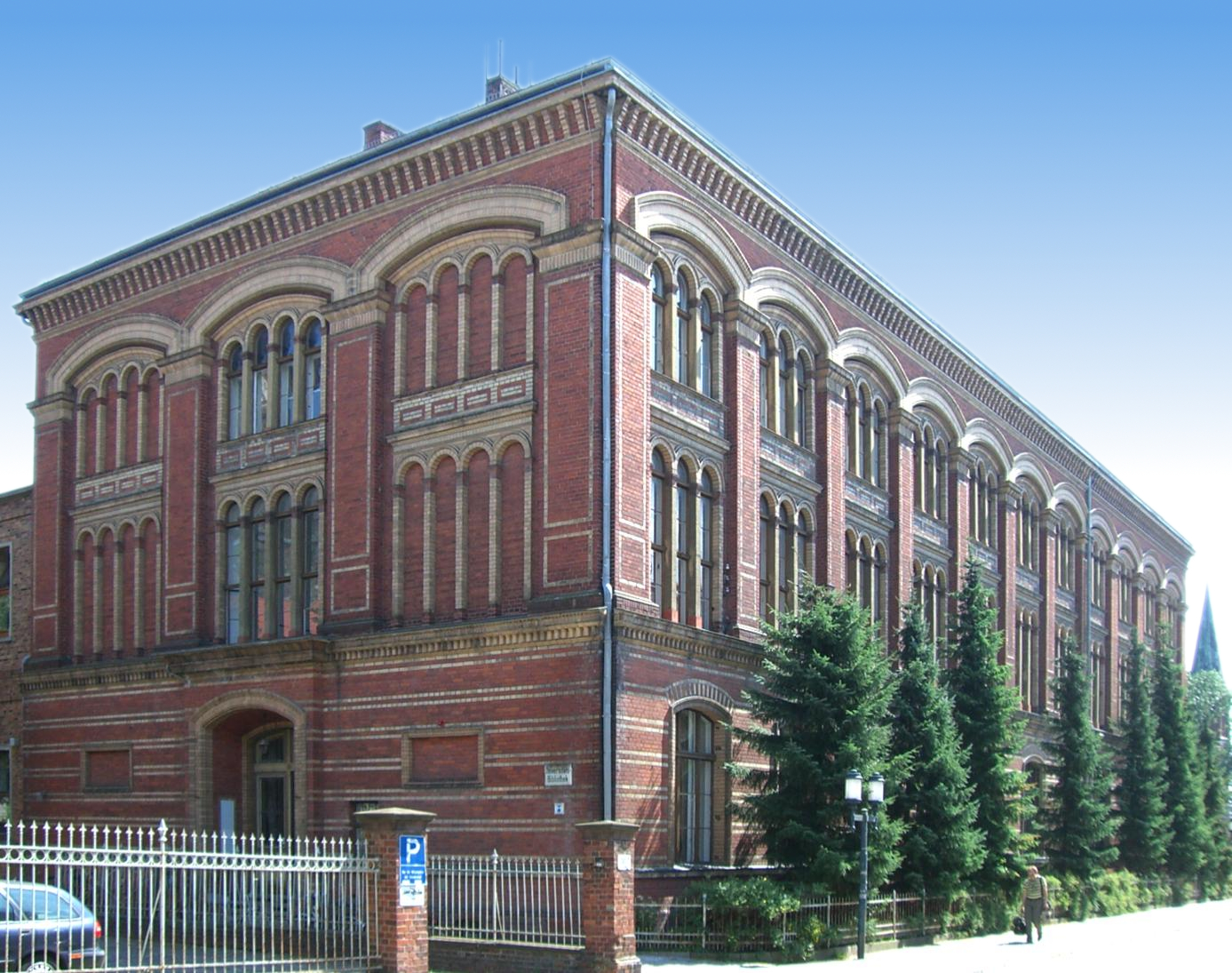 Greifswald